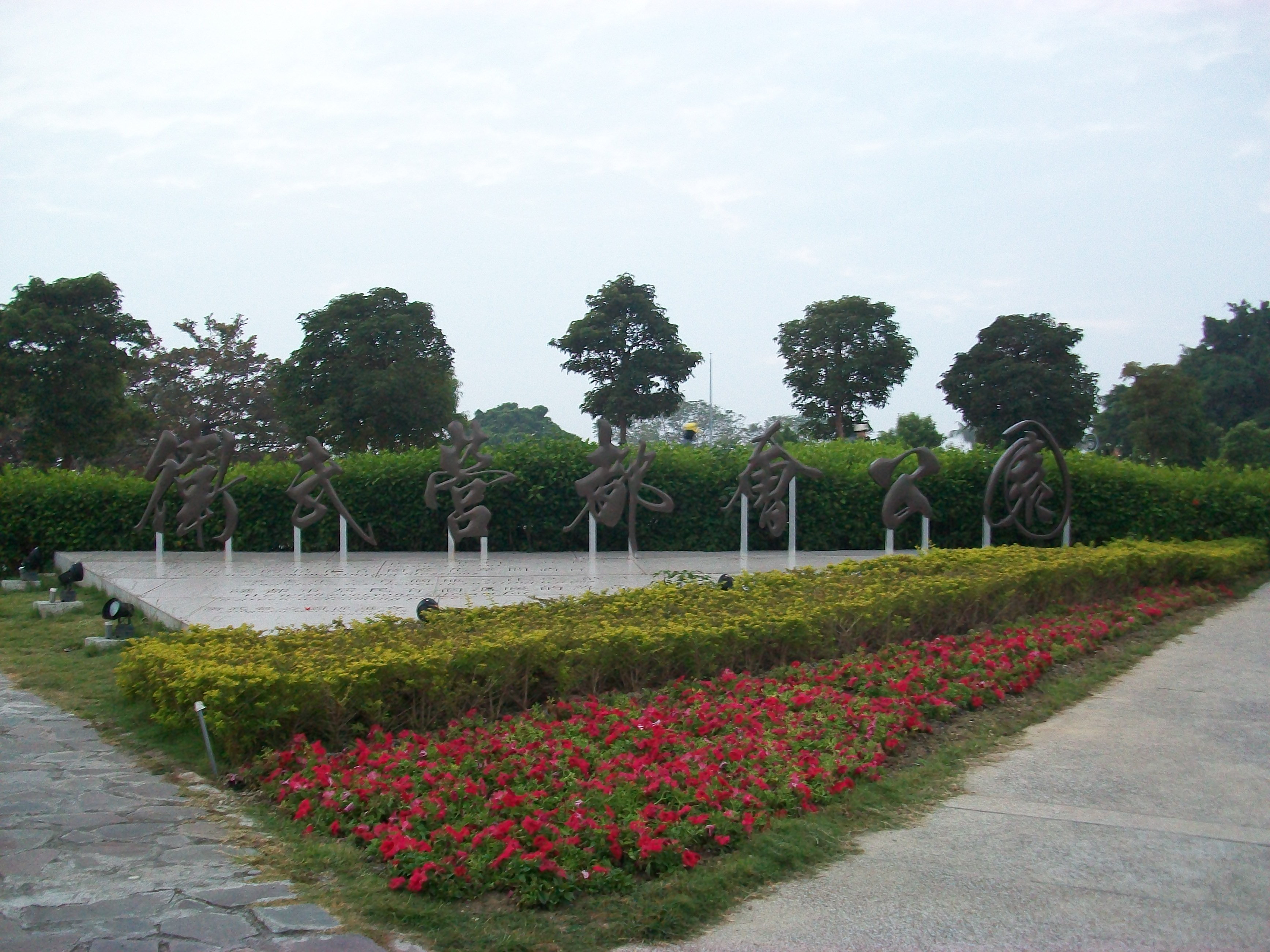 衛武營都會公園 北區入口